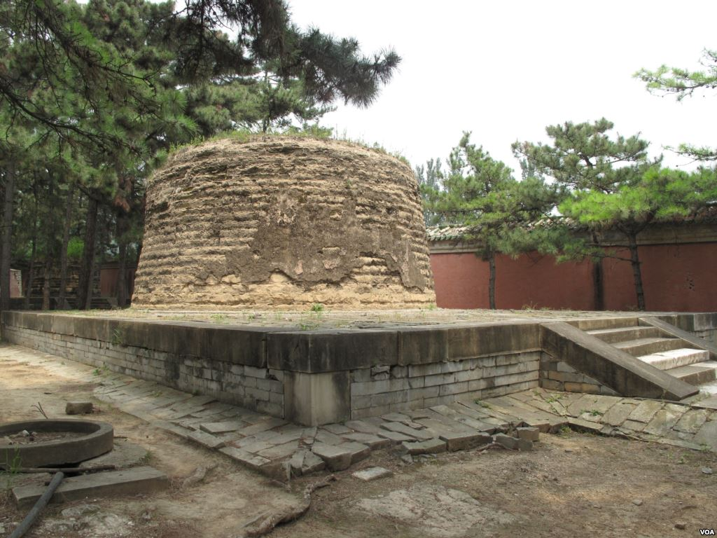 清东陵裕妃园寝中的容妃墓。学者考证，容妃是传说中的“香妃”原型。(美国之音拍摄）